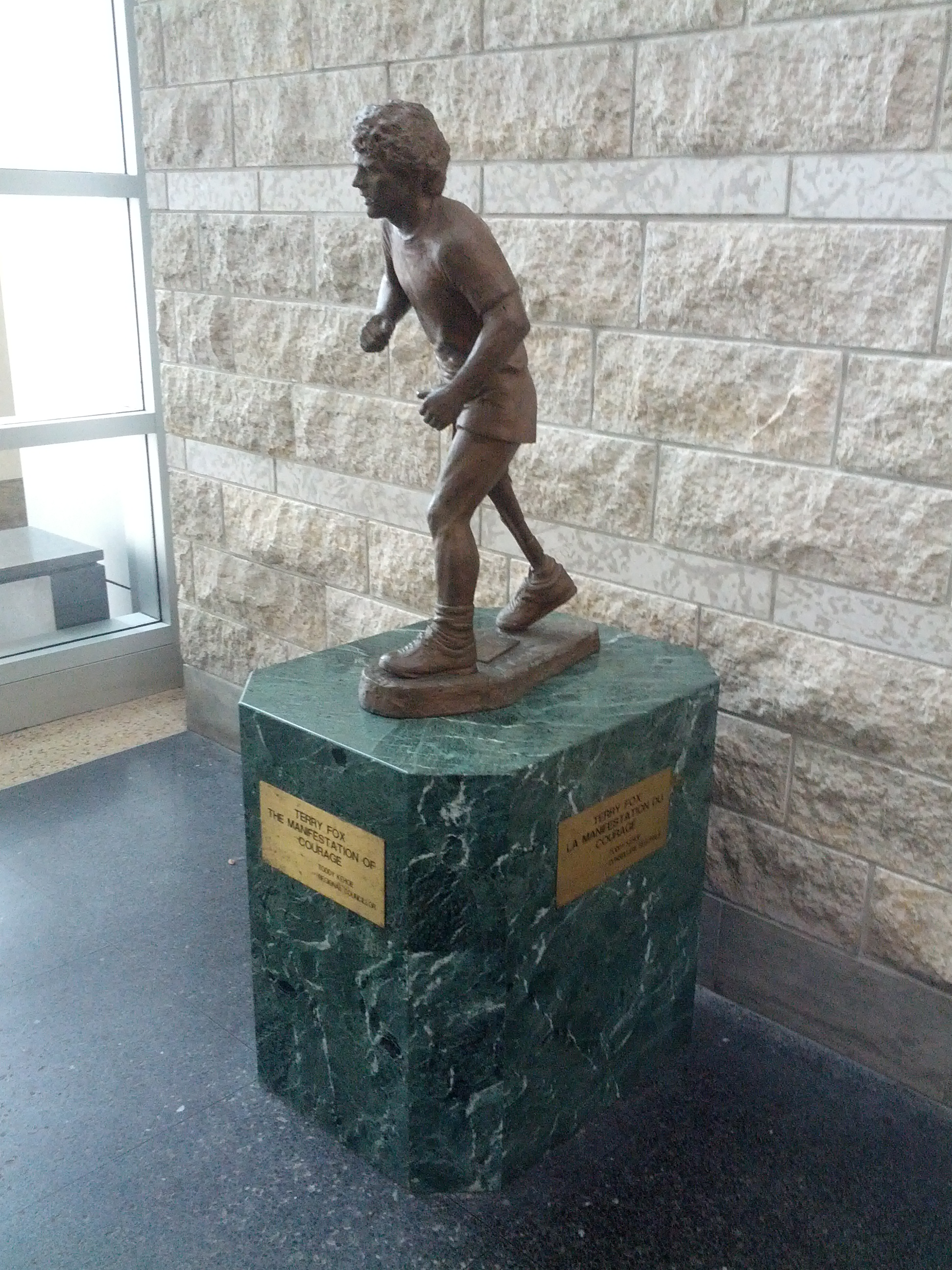 Estátua de Terry Fox na prefeitura de Ottawa.